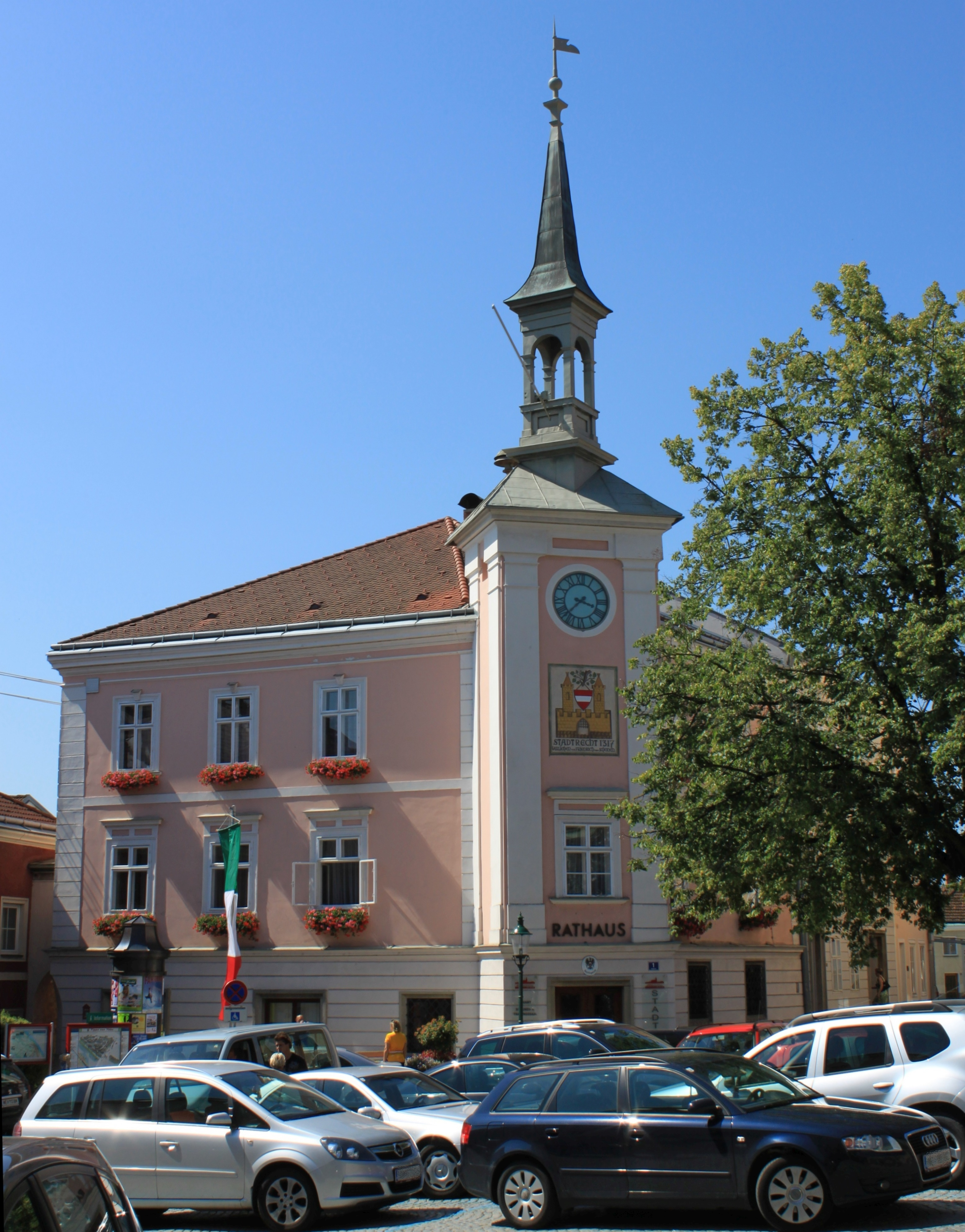 Rathaus, Hauptplatz 1, 3370 Ybbs an der Donau, Niederösterreich